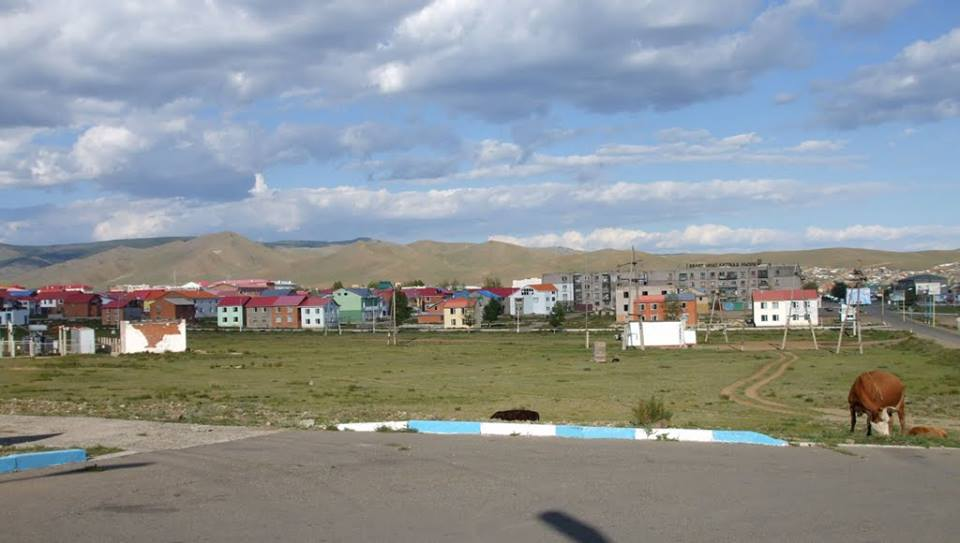 Монгол: Төв аймаг-Зуунмод хот